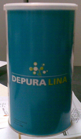 Lata de depuralina, um suplemento alimentar dietético. A qualidade da foto não é a melhor, mas só tinha o telemóvel comigo...